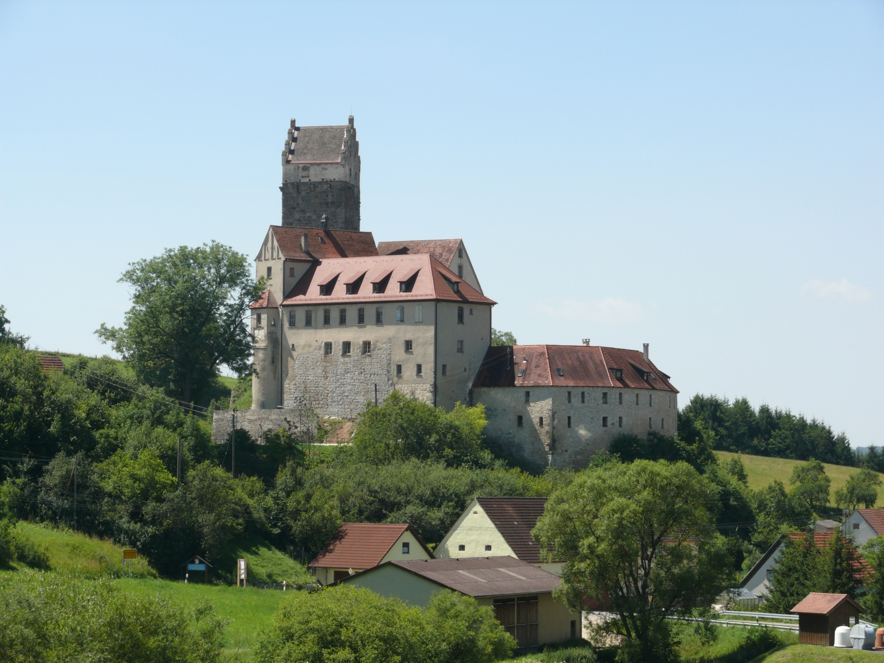 Burg Katzenstein, Dischingen, Germany